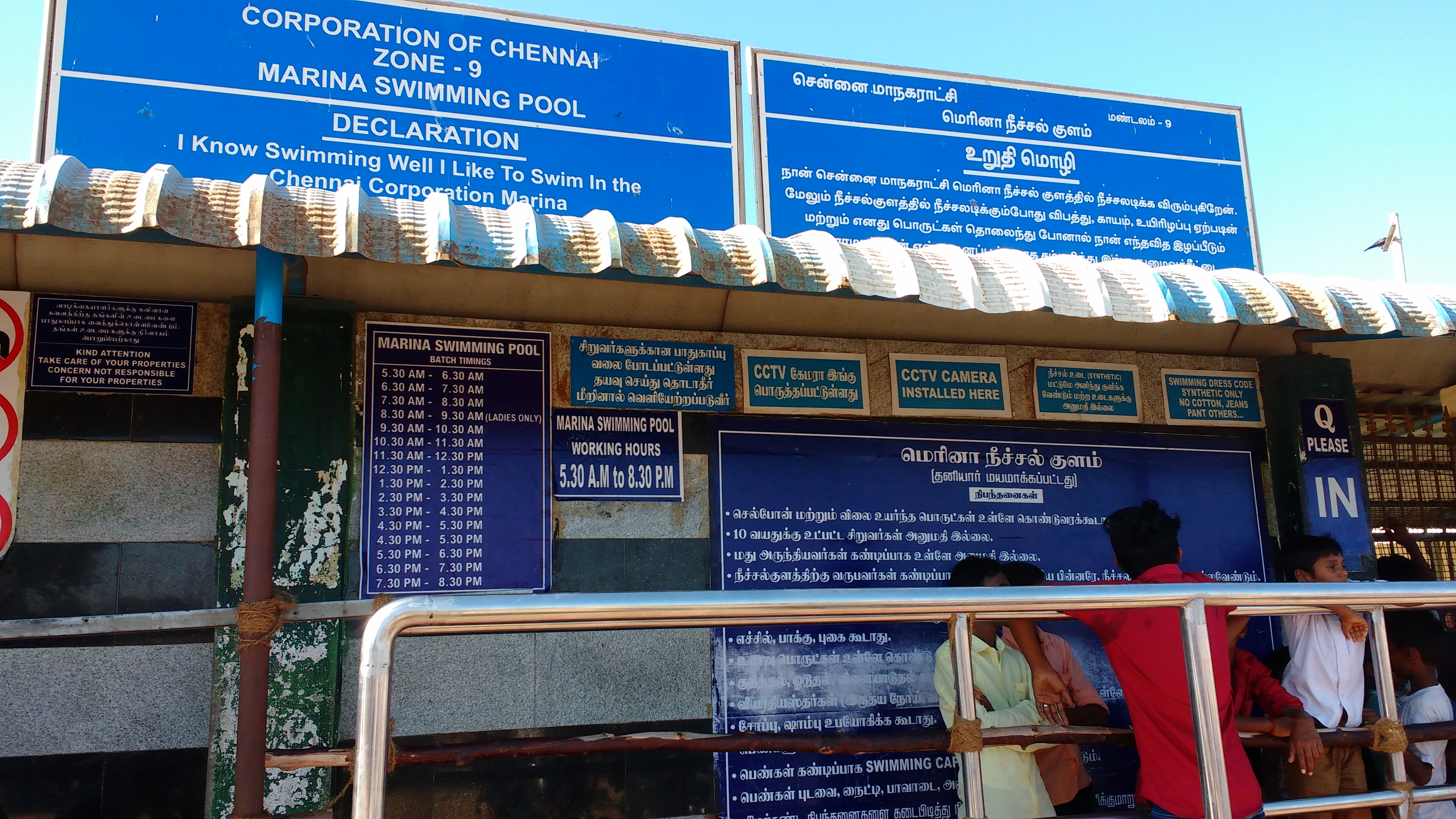 சென்னை மெரினா நீச்சல் குளத்தில் உள்ள அறிவிப்பு பலகைகள்